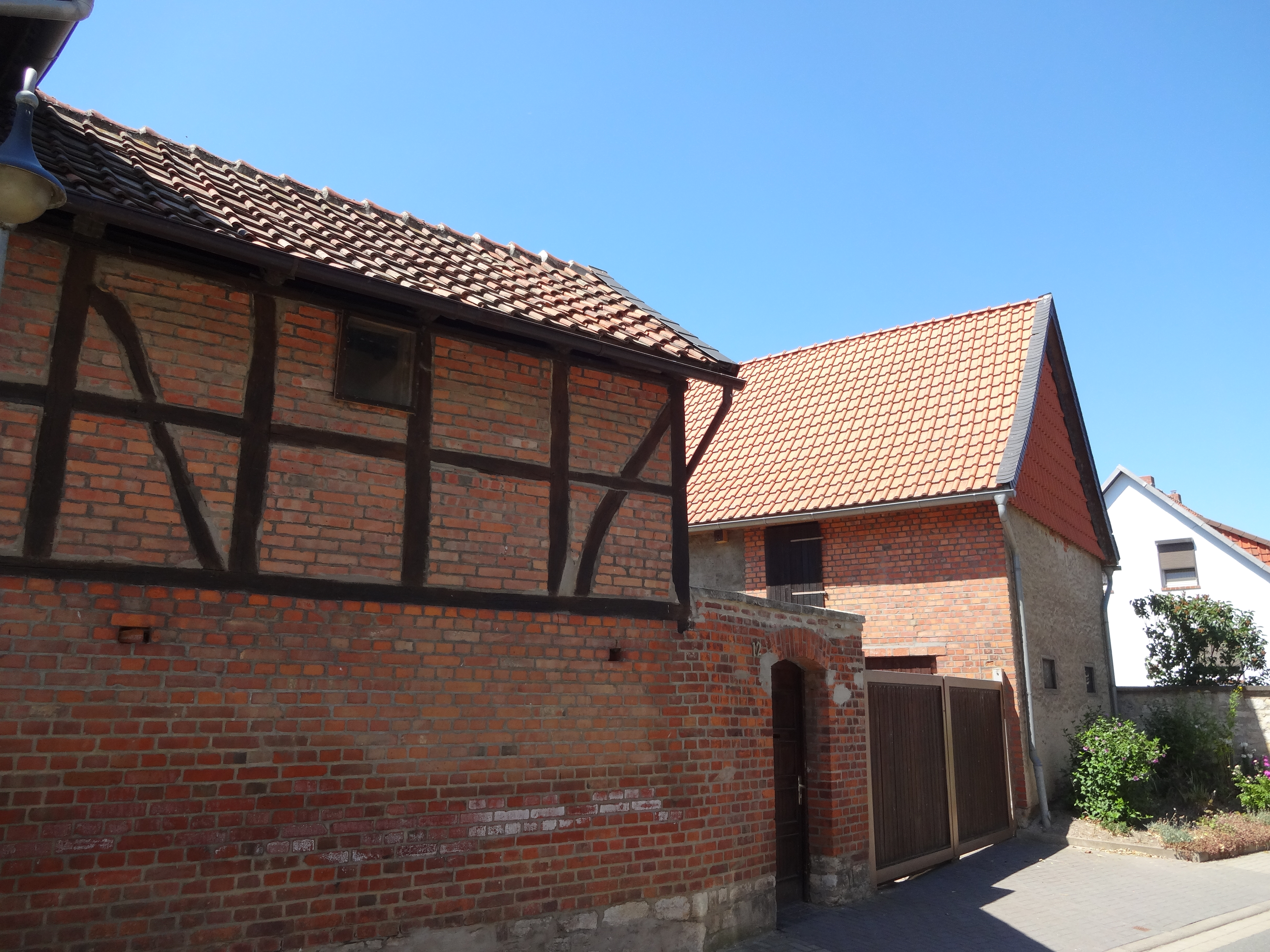 denkmalgeschützter Bauernhof in der Straße Im Pfeilern 12 in Dedeleben